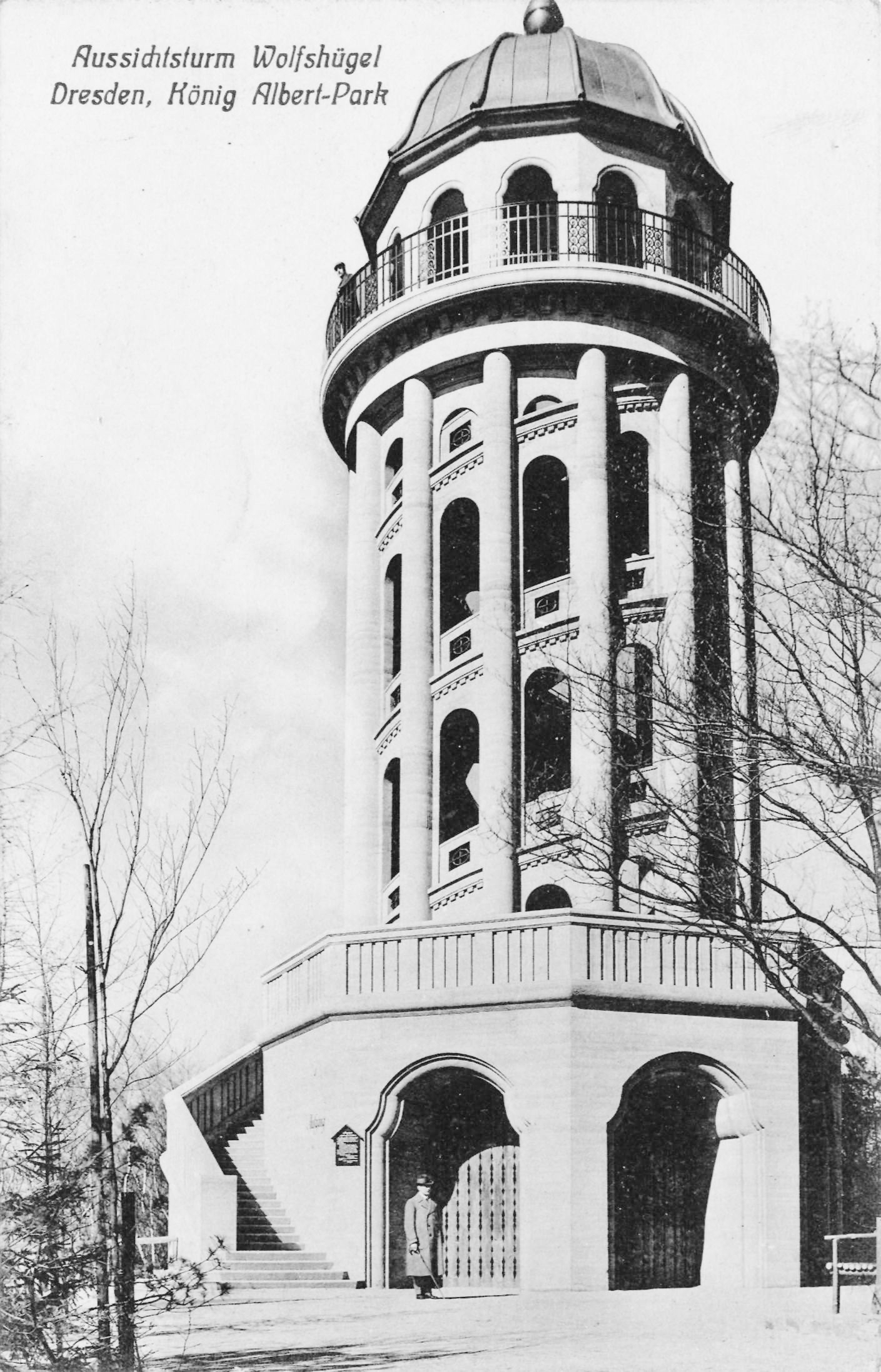 Aussichtsturm Wolfshügel; König-Albert-Park